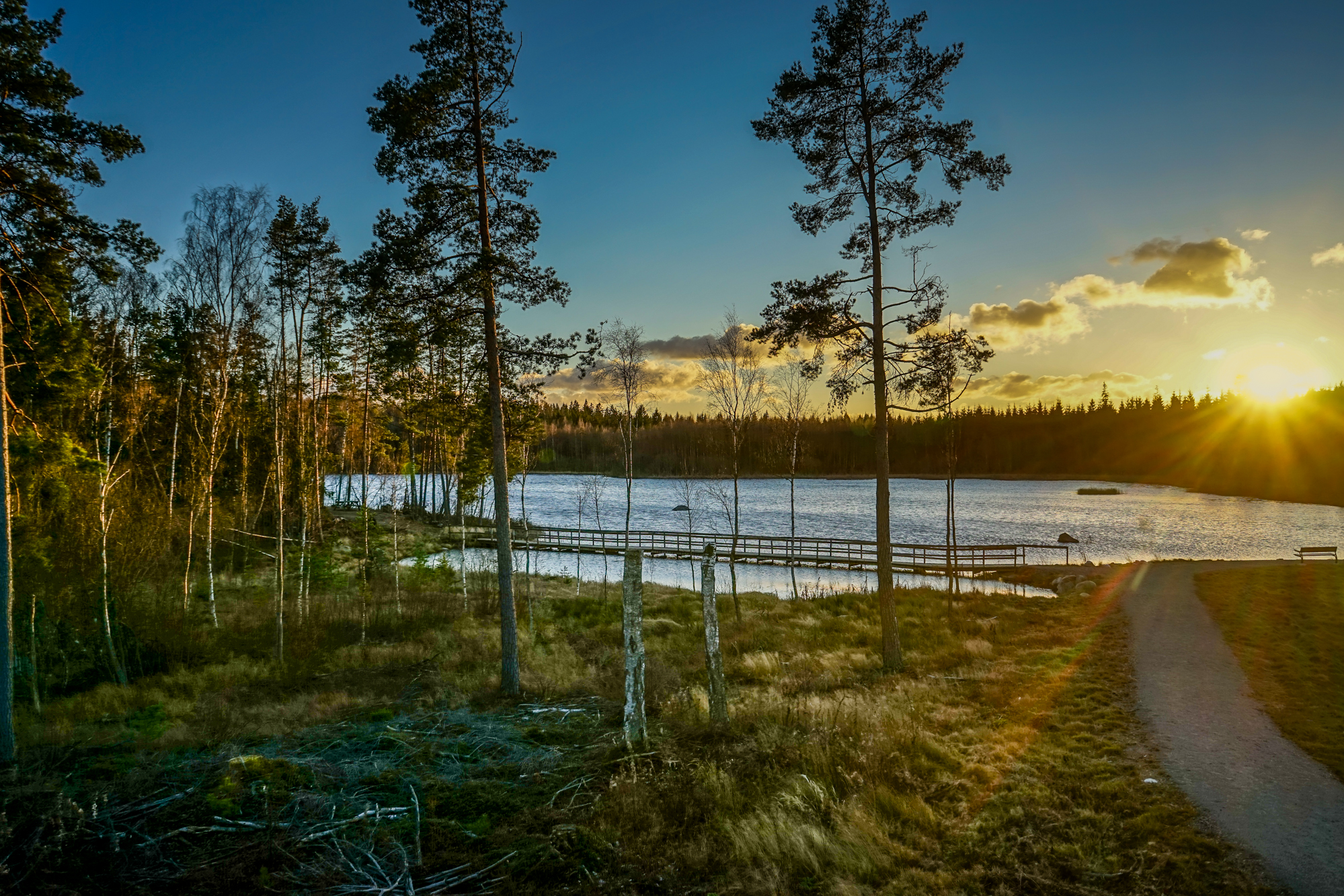 Rävsjön